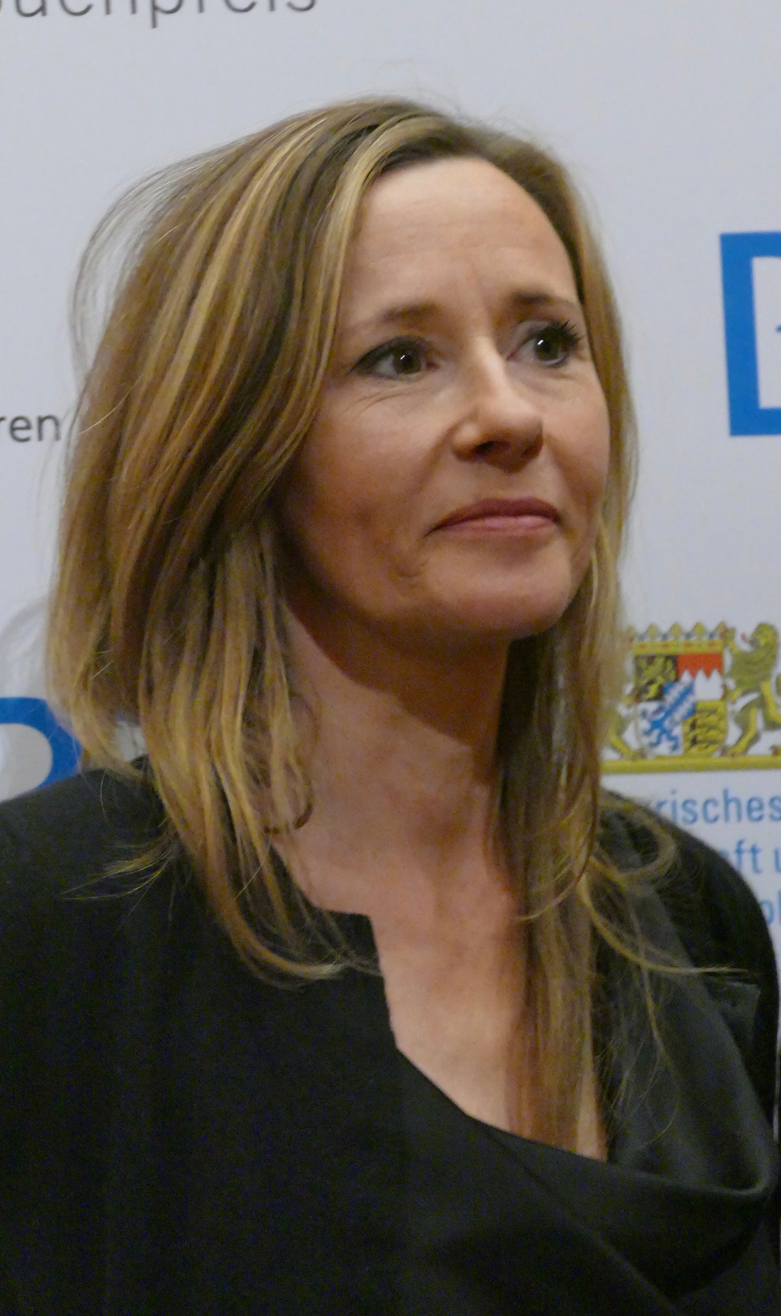 Andrea Wulf erhielt den Bayerischen Buchpreis 2016 in der Kategorie Sachbuch für "Alexander von Humboldt und die Erfindung der Natur".